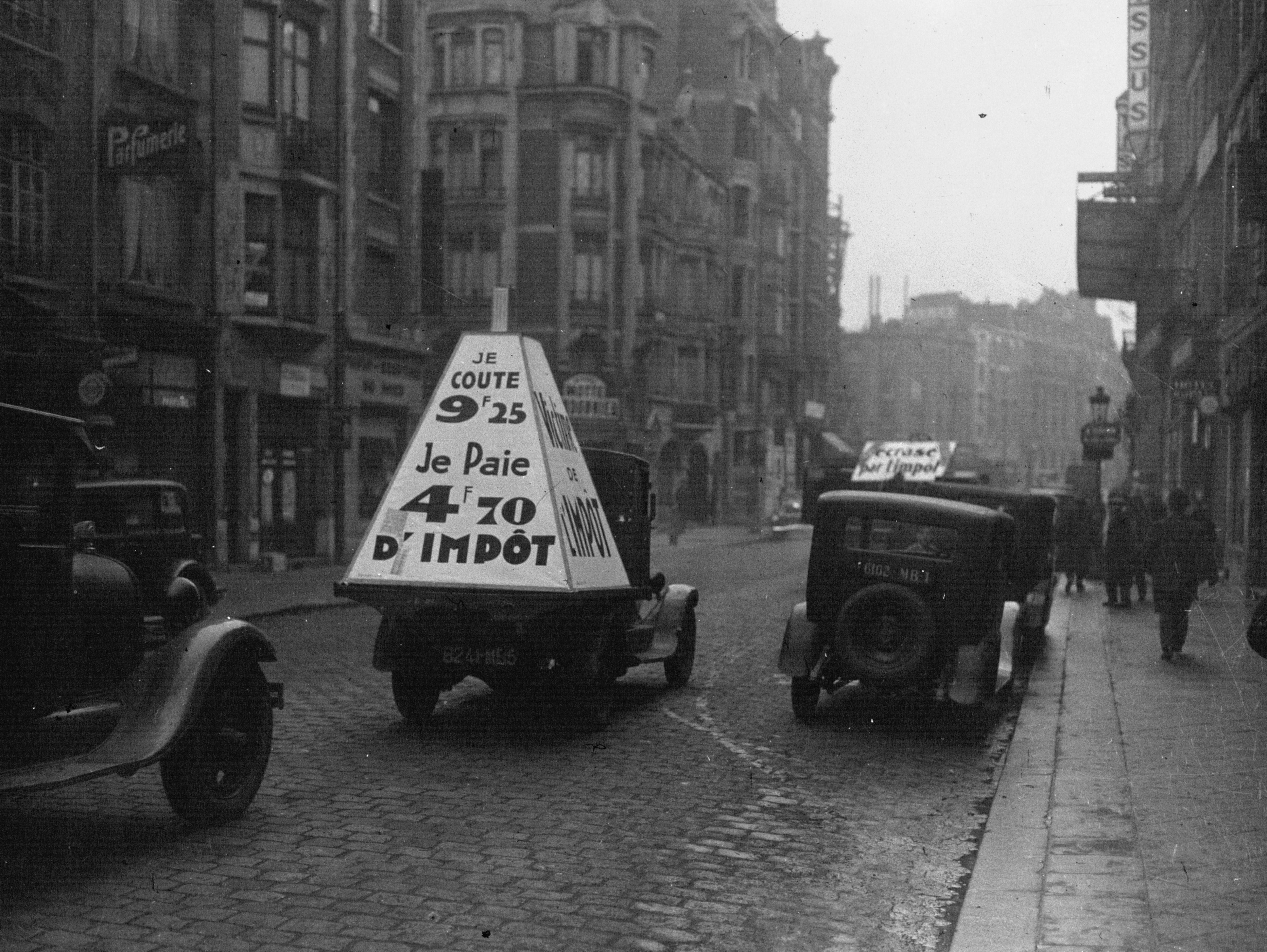 Automobilistes protestant contre les nouveaux impôts sur l'essence à Lille (France - dép. du Nord - rue de Paris, actuelle rue Pierre Mauroy).